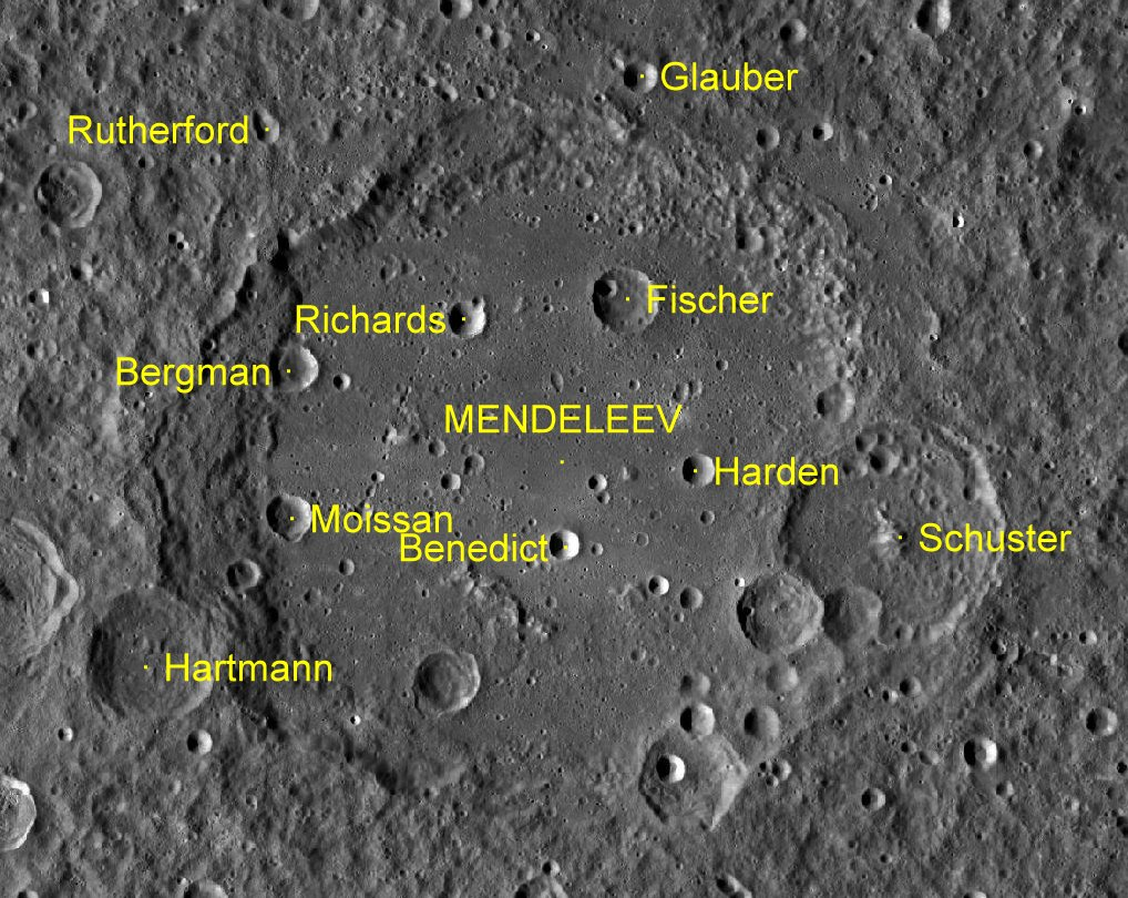 Cráter lunar Mendeleev. Localización. (Imagen LRO)